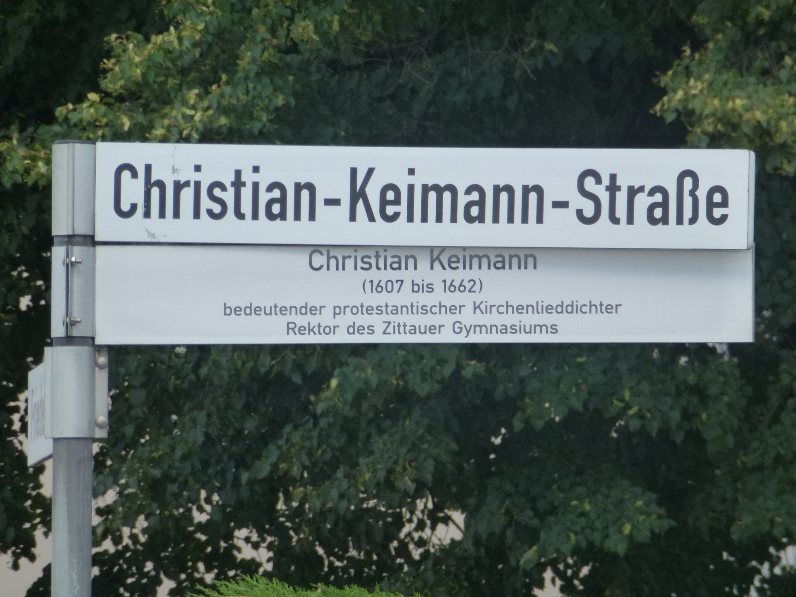 Foto des Straßenschildes Christian-Keimann-Straße in Zittau